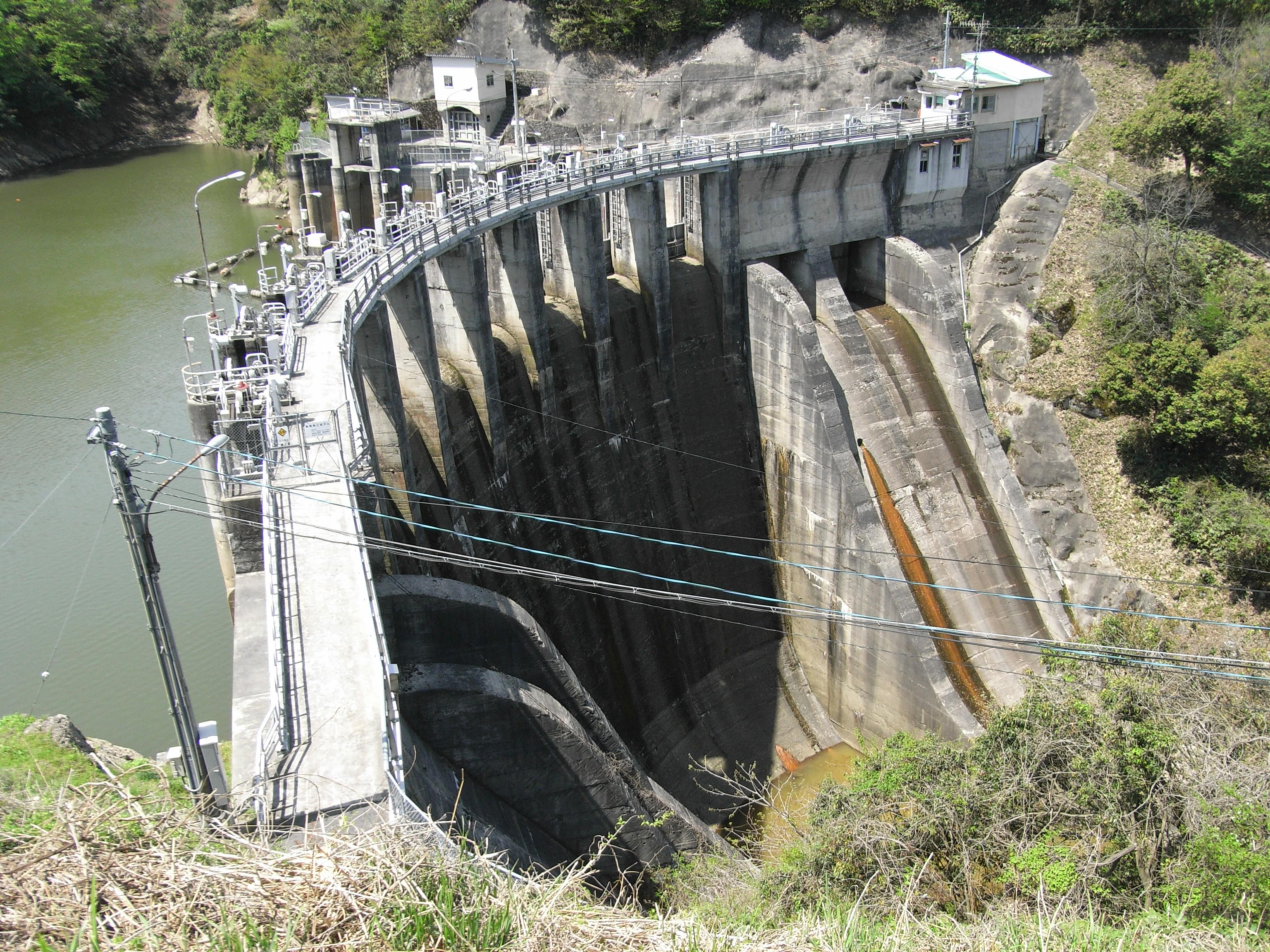 Dam